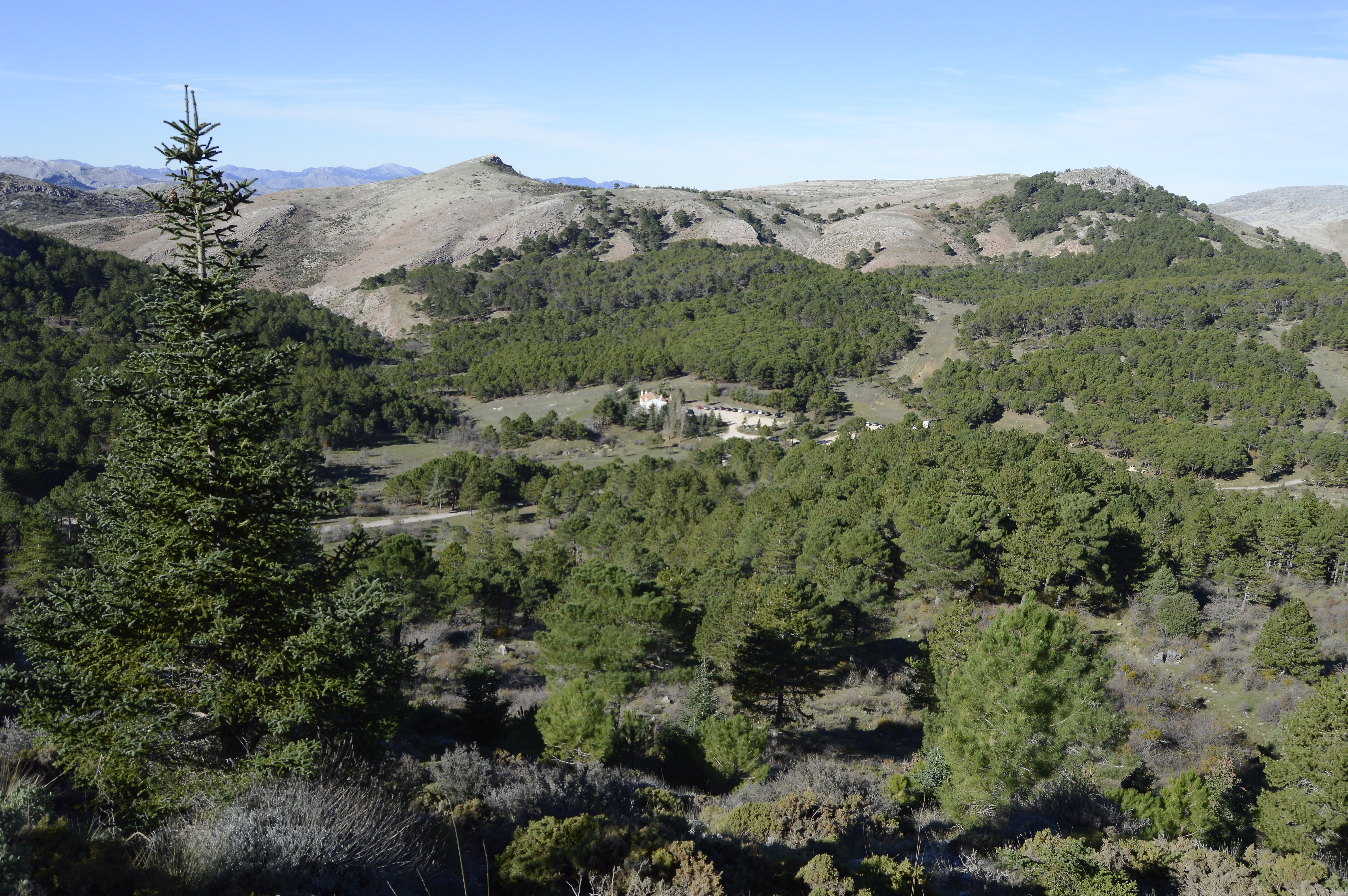 Vista del bosque de pinos en la Sierra de las Nieves de Málaga (España)